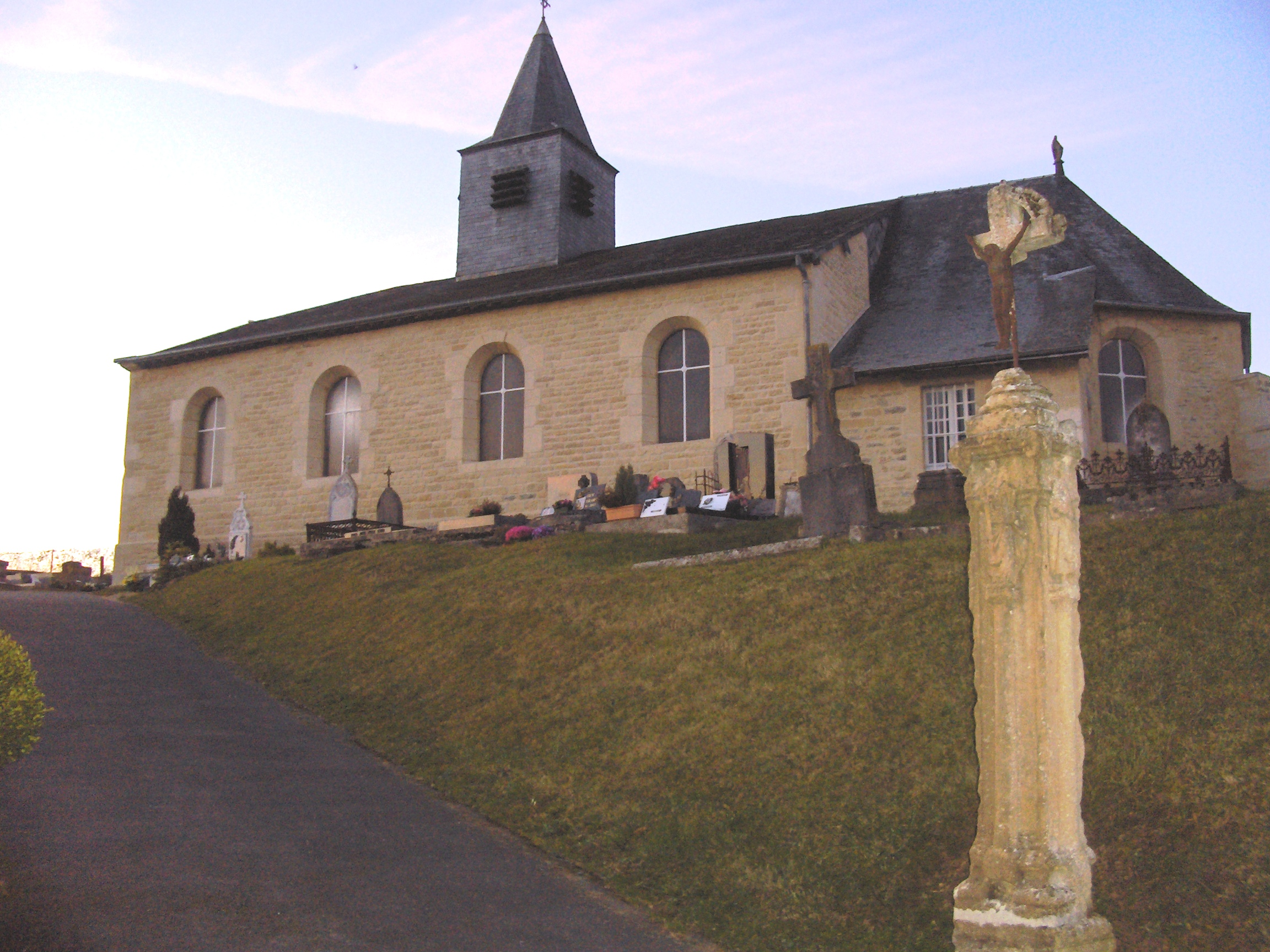 église de Lametz